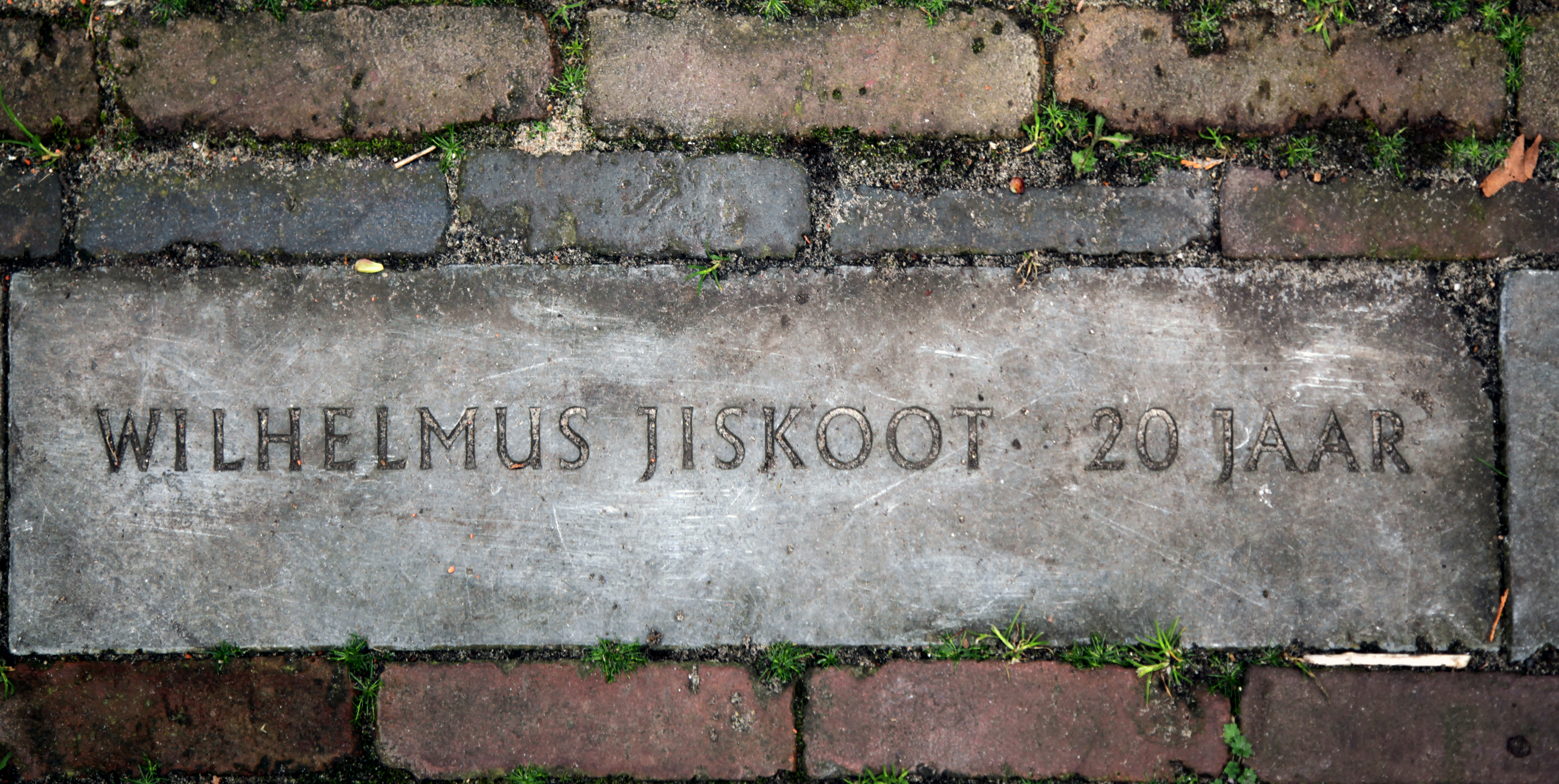 Naam en de leeftijd van een van de 15 slachtoffers gefusilleerd in Haarlem op 7 maart 1945 (2)